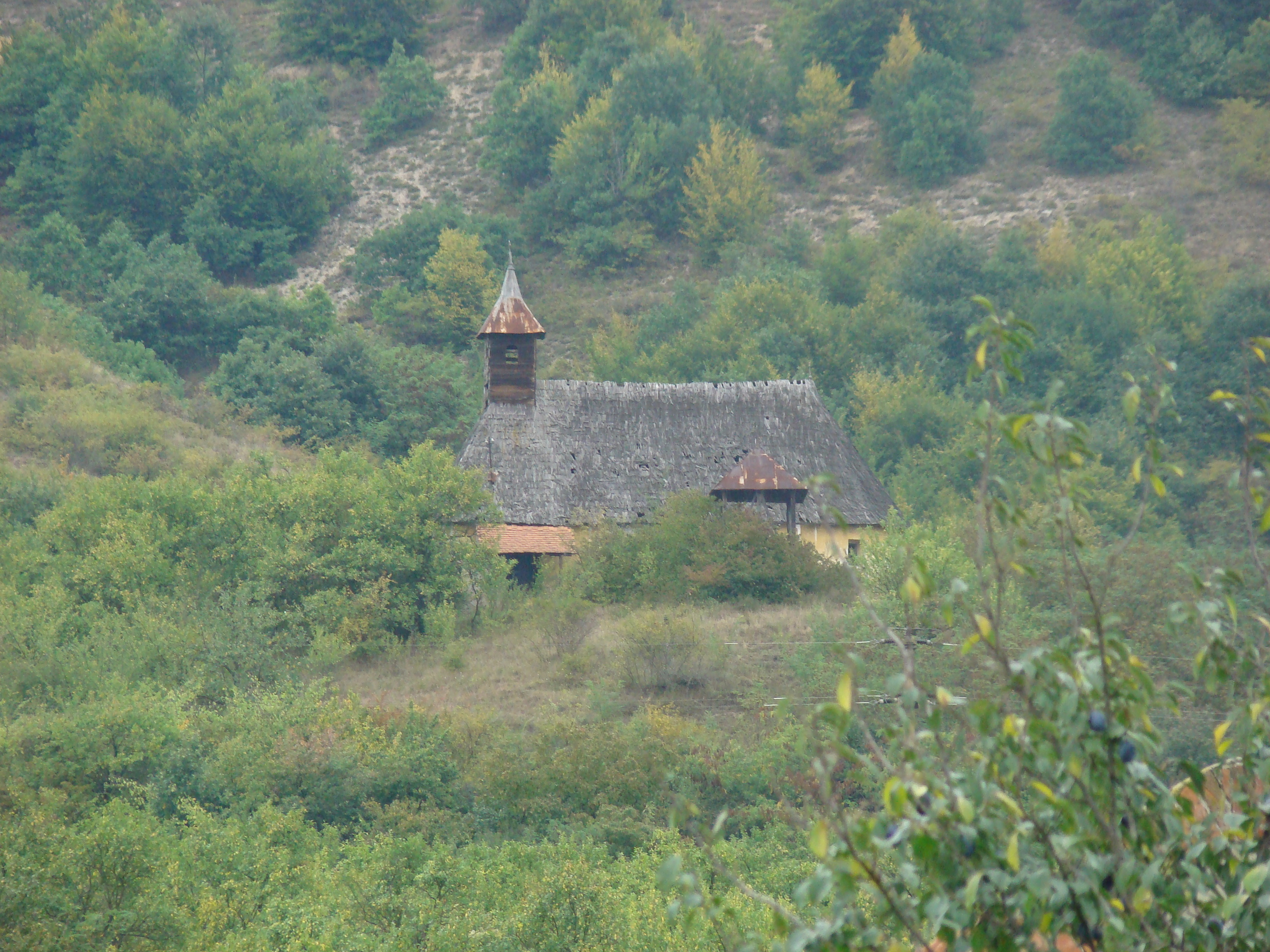 Biserica de lemn din Chimindia-Hunedoara